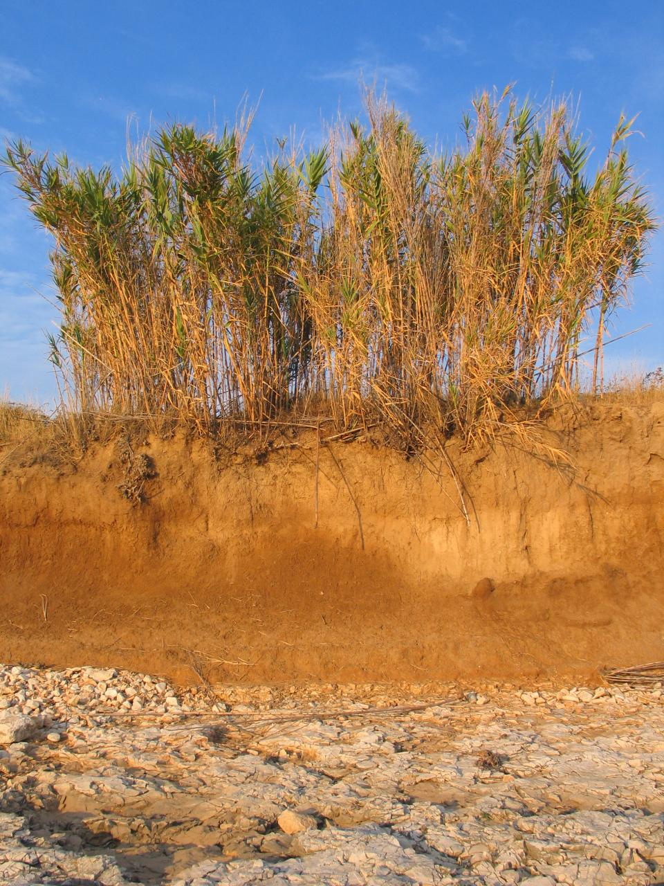 Reeds on Unije island